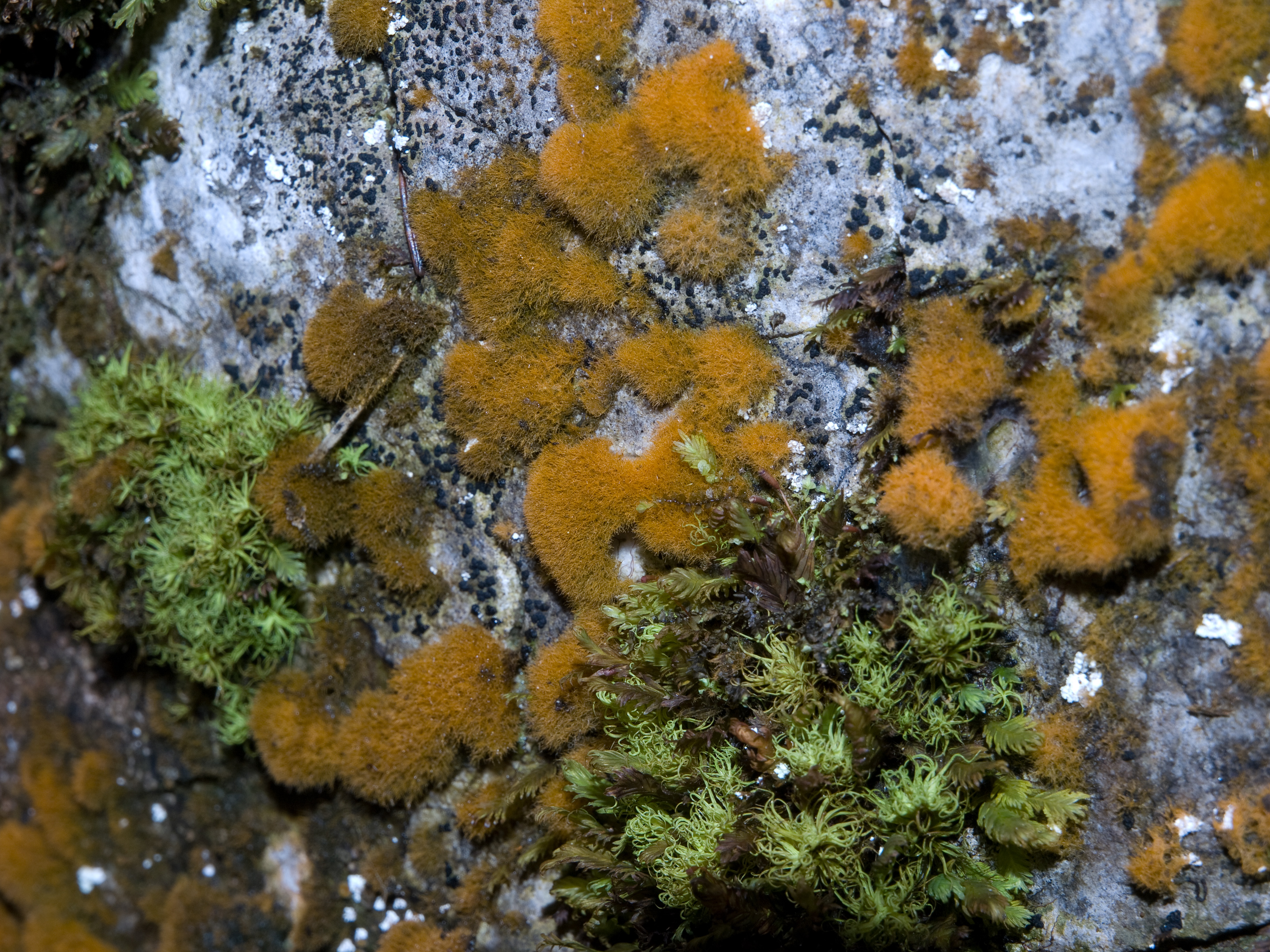 Luftalge Trentepohlia aurea Picture taken in Berchtesgaden/Bavaria